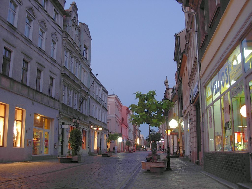 Ulica Długa w Bydgoszczy